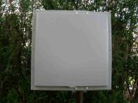 Sujet: Antenne directionnelle plate ou panneau (patch) 2.4 GHz pour Wifi&ISM .Ex: réception des signaux "plus faibles" d'une caméra sans fil numérique ou analogique. Auteur/source: Serge Nueffer